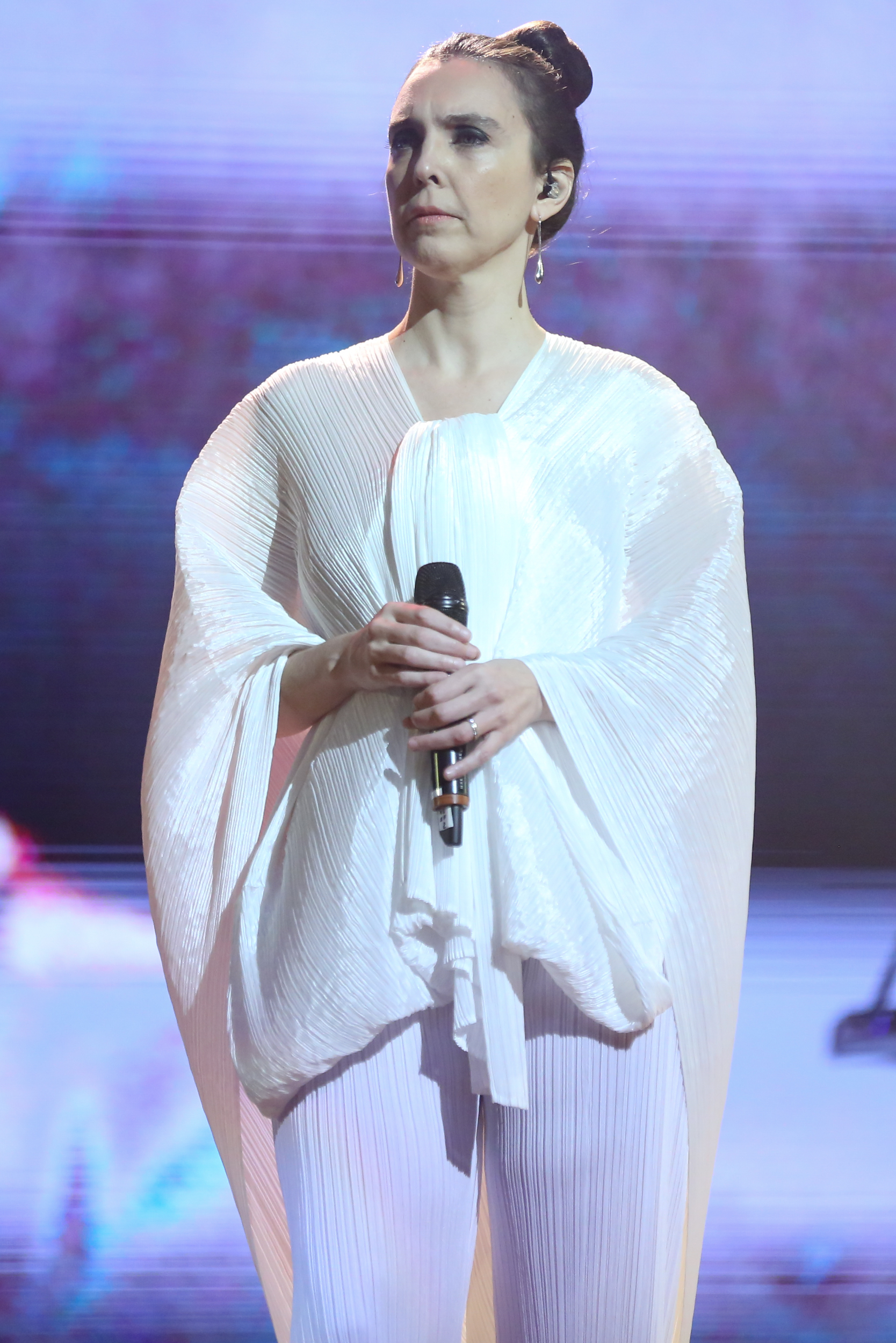 Adriana Calcanhotto - 26° Prêmio da Música Brasileira 2015, no Theatro Municipal, no Centro do Rio de Janeiro/RJ. (10/06/15) Foto: Roberto Filho/Divulgacão